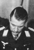 Job Odebrecht, Ausschnitt aus: Bundesarchiv Bild 146-1971-033-33, Lagebesprechung im Hauptquartier der Heeresgruppe Weichsel.jpg